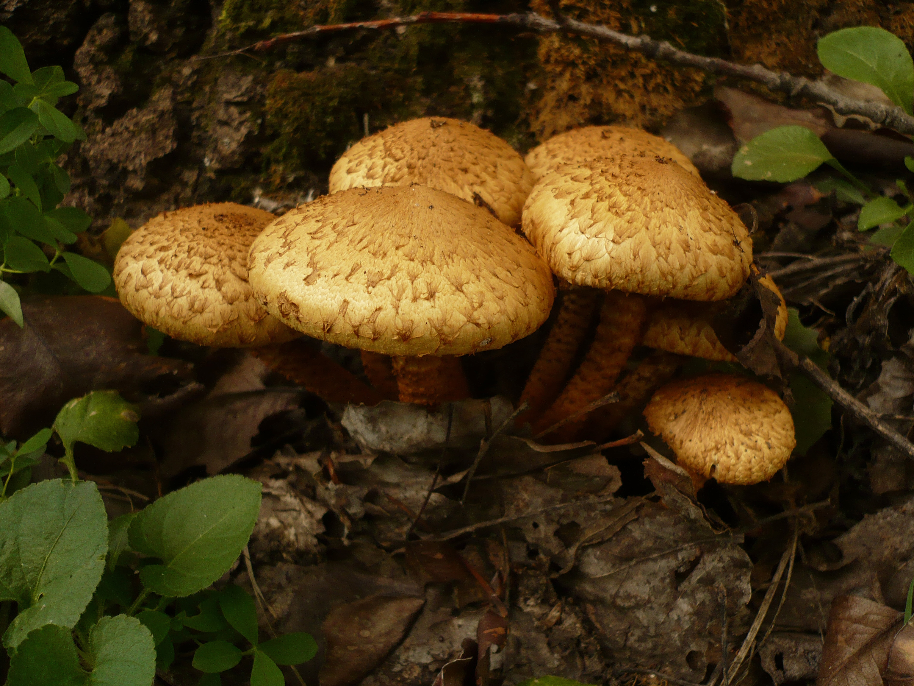 Чешуйчатка, вид не определён. Урочище Стрелица, Шебекинский район Белгородской области.